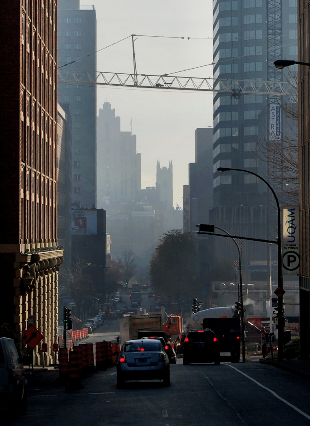 Rue Saint-Urbain à Montreal